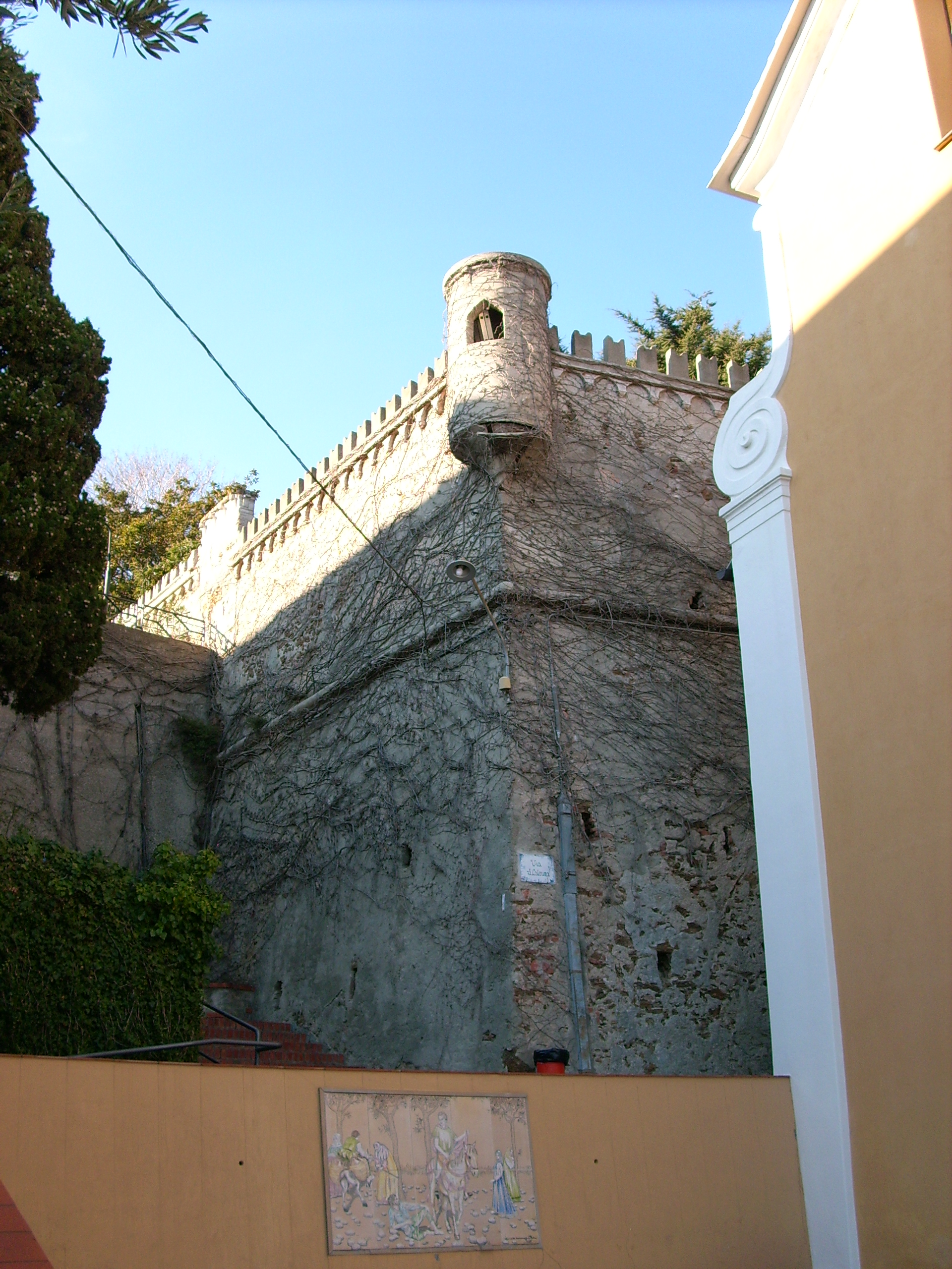 Forte a Bergeggi, Liguria, Italy